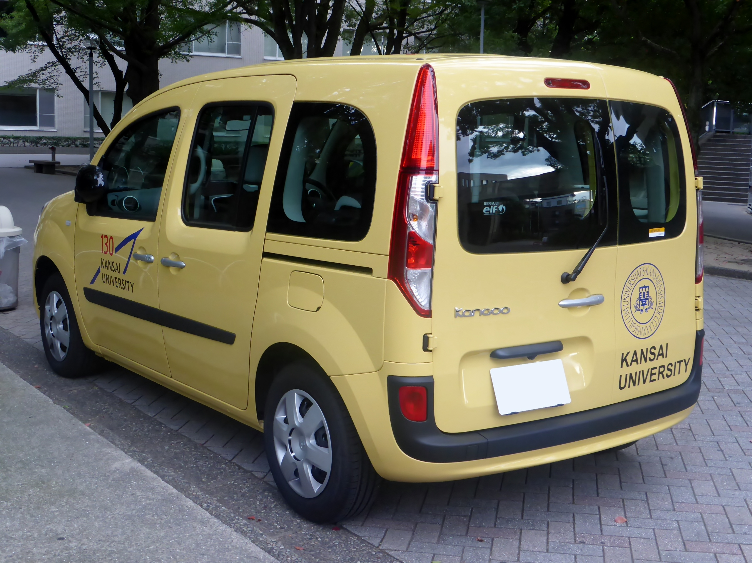 関西大学の業務車両に用いられている2代目ルノー・カングーZENをリアから撮影。